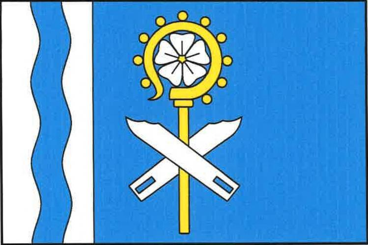 Čistá u Horek vlajka